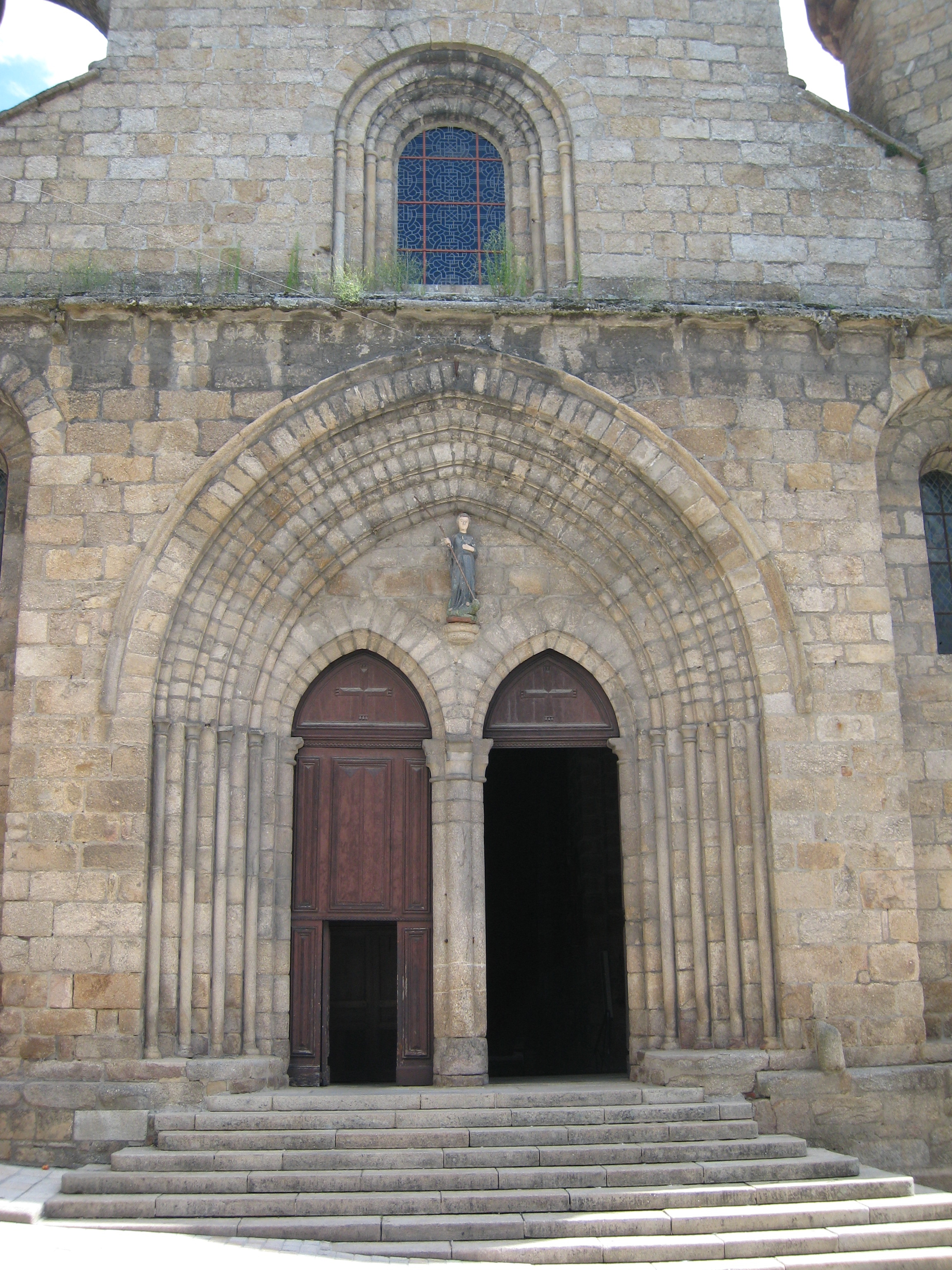 Façade de la collégiale de Saint-Junien, Haute-Vienne (87), France